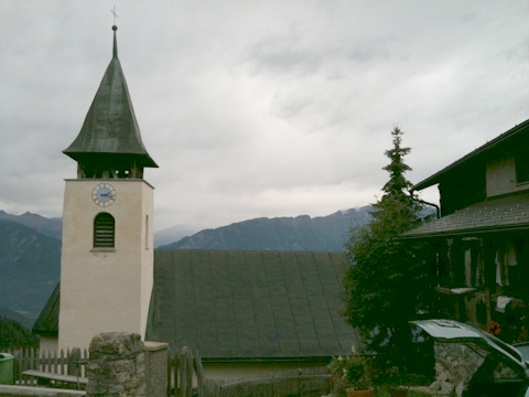 reformierte Kirche Trans, Kanton Graubünden